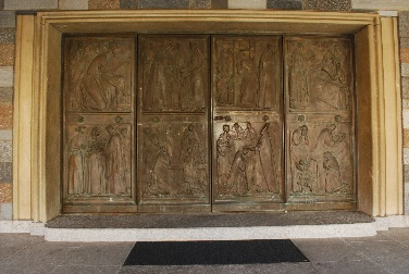 Portale Maggiore della chiesa di San Nicolao a Lugano